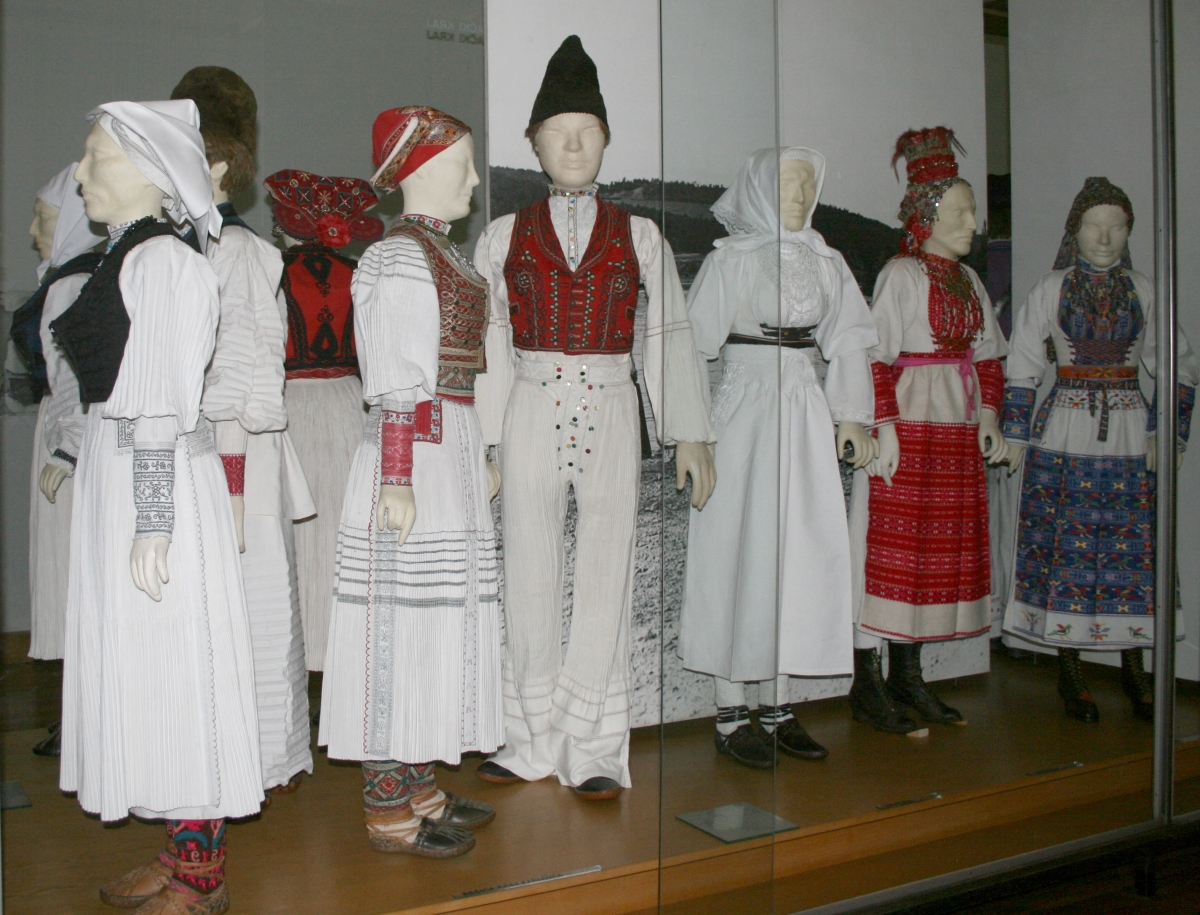 snimljeno tijekom Noći muzeja u Etnografskom muzeju u Zagrebu